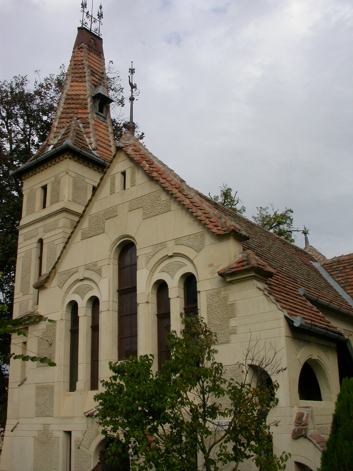 Biserica reformată, 1888